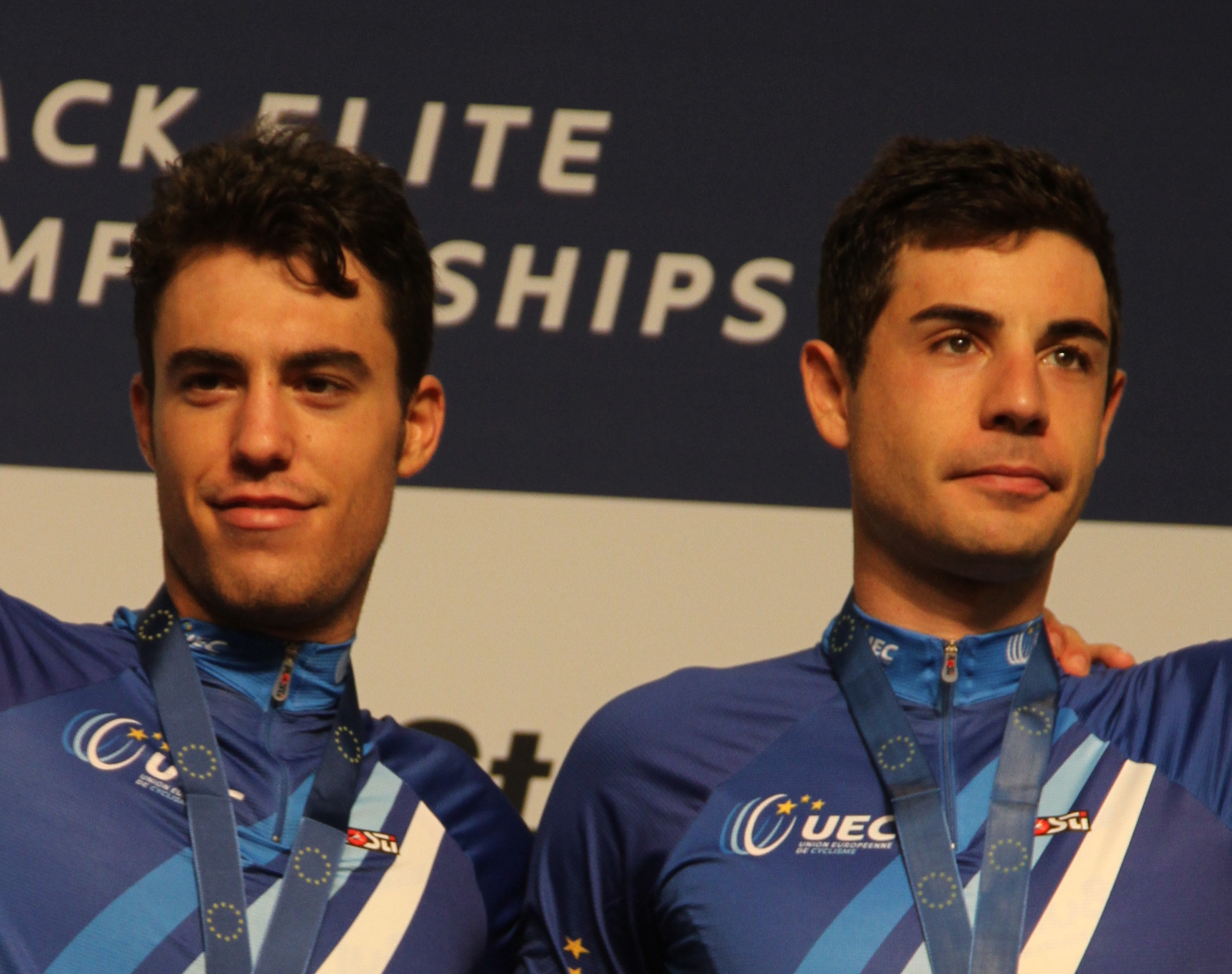 Albert Torres (l.) und Sebastían Mora, Europameister im Zweier-Mannschaftsfahren The making of this document was supported by the Community-Budget of Wikimedia Germany.